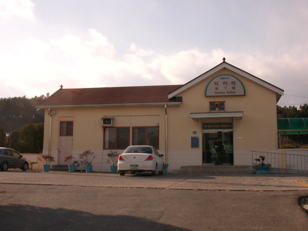 동해남부선 덕하역